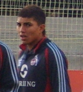 Adil Chihi, 1.FC Köln